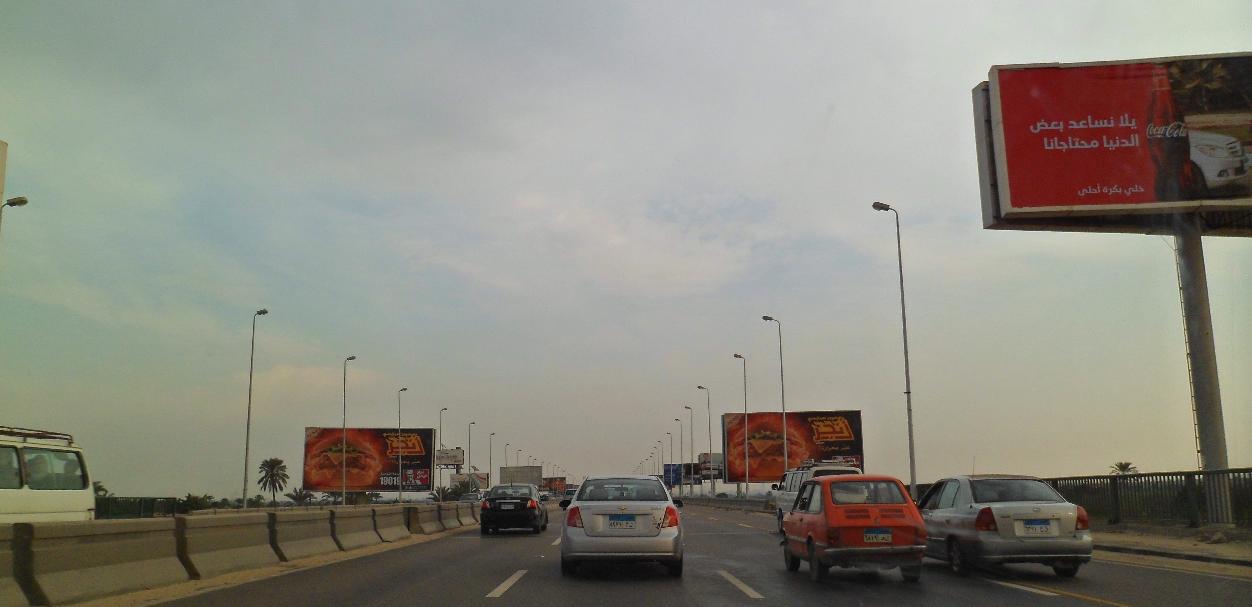 محور 26 يوليو، مشارف الجيزة، مصر